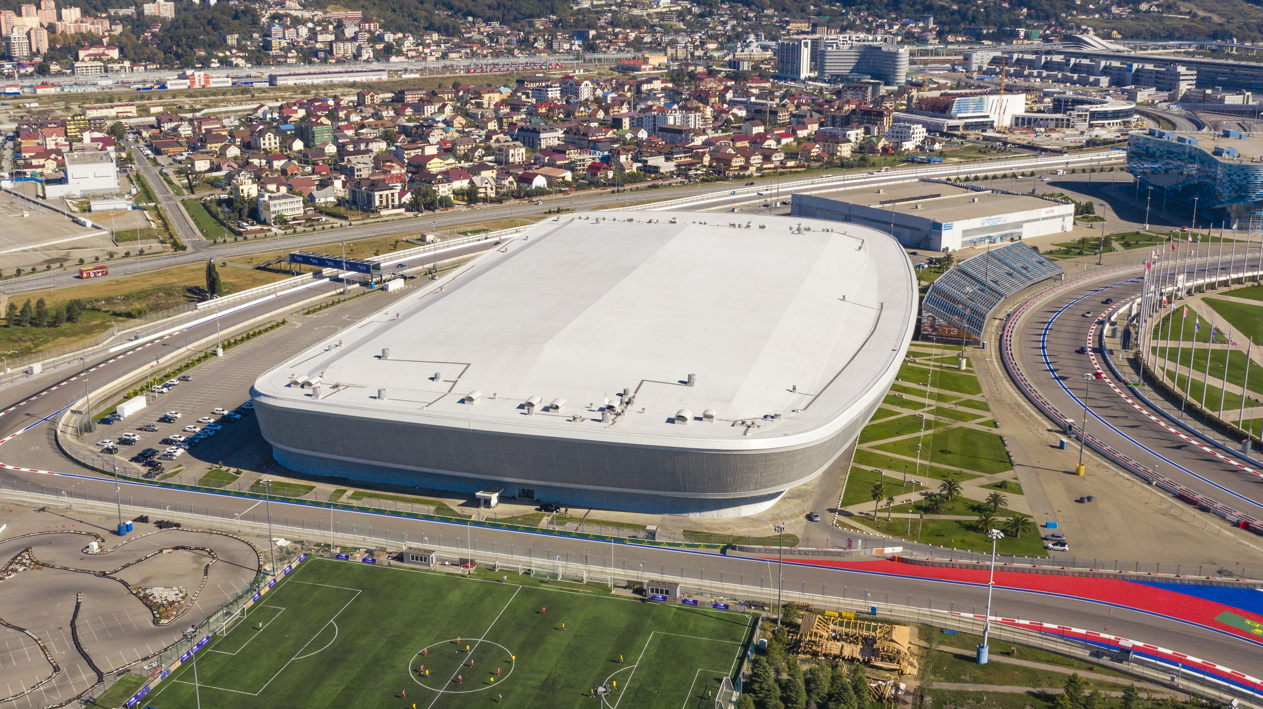 Blick auf den Olympiapark Adler (Sotschi)